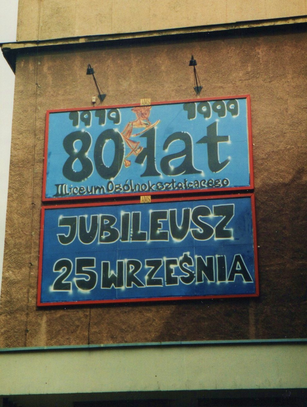 80-lecie II LO w Poznaniu - 25.9.1999r.